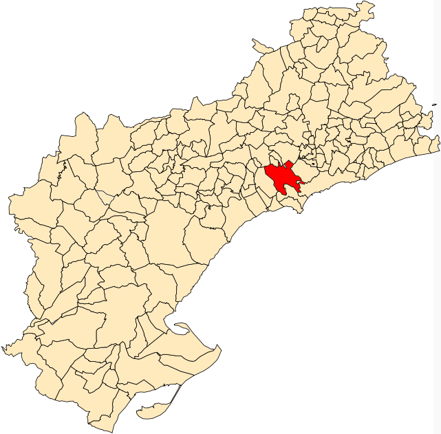 Situación del término municipal de Reus respecto a la provincia de Tarragona, en España.